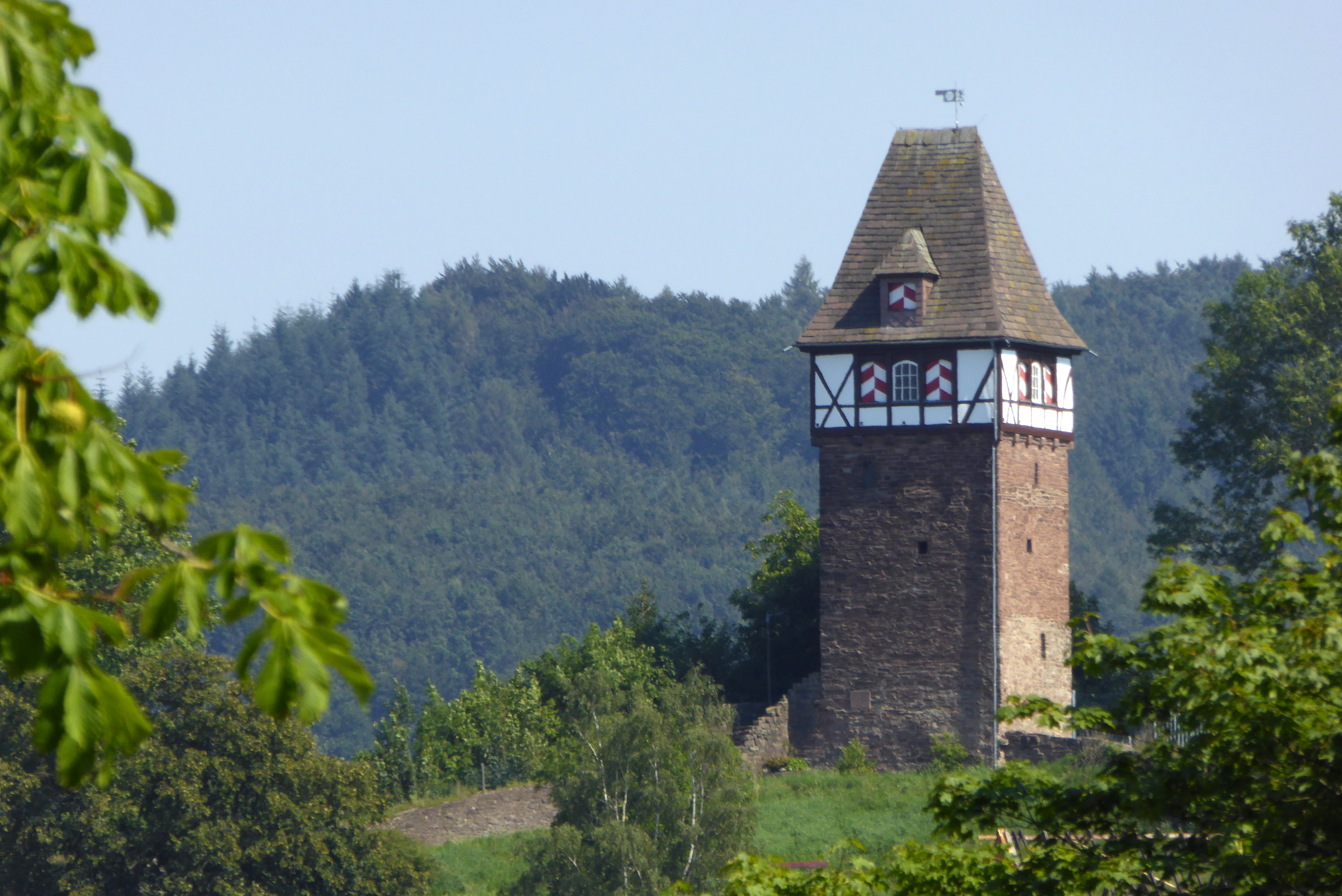 Försterbergturm in Stadtoldendorf, Landkreis Holzminden, Niedersachsen. Der ehemaligen Turm der Stadtbefestigung auf dem Försterberg wurde nach langjährigem Verfall 1936 wieder erhöht und mit Fachwerkaufsatz und Dach versehen, er ist seitdem Wahrzeichen der Stadt Stadtoldendorf. Angrenzend an den Turm sind Reste der Stadtmauer erhalten